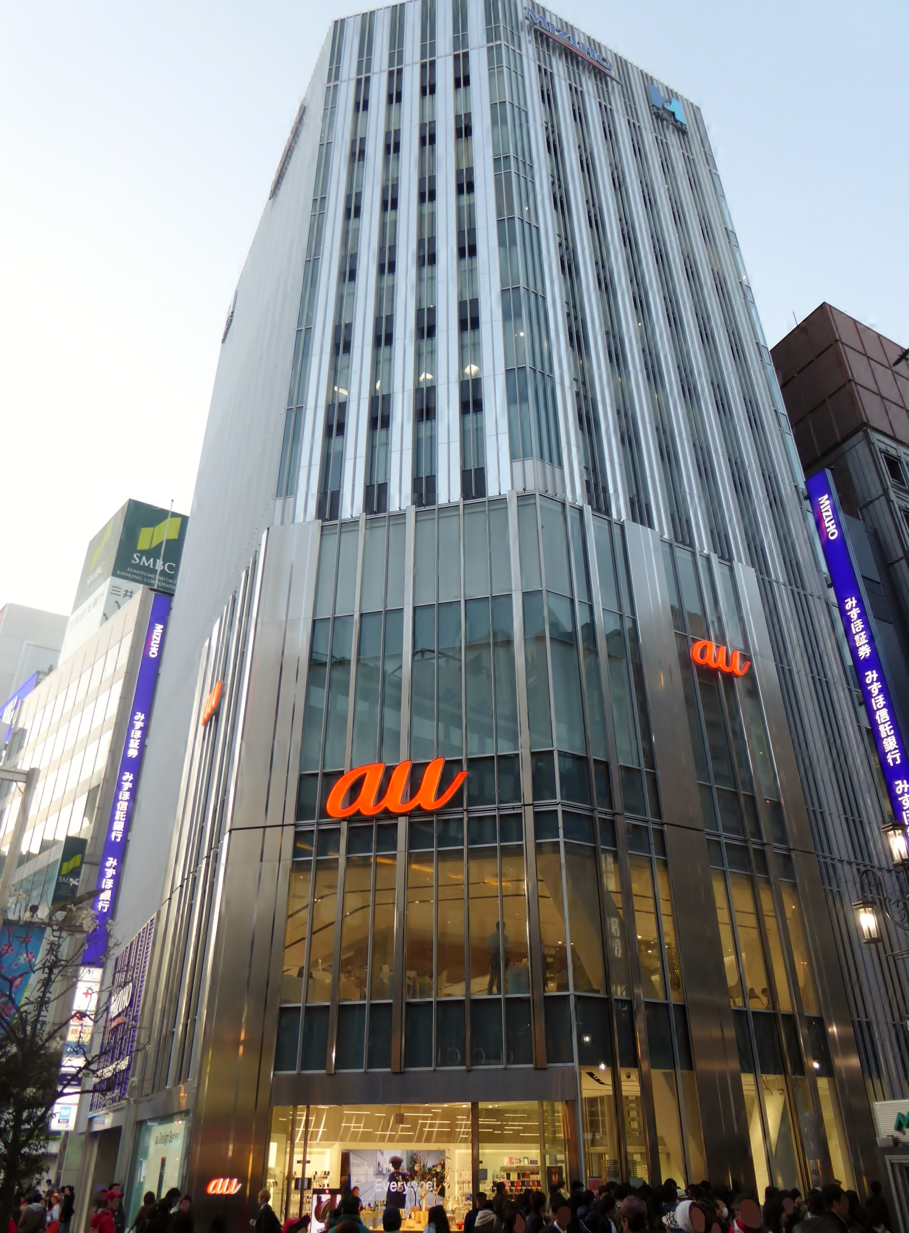 au SHINJUKUを撮影。